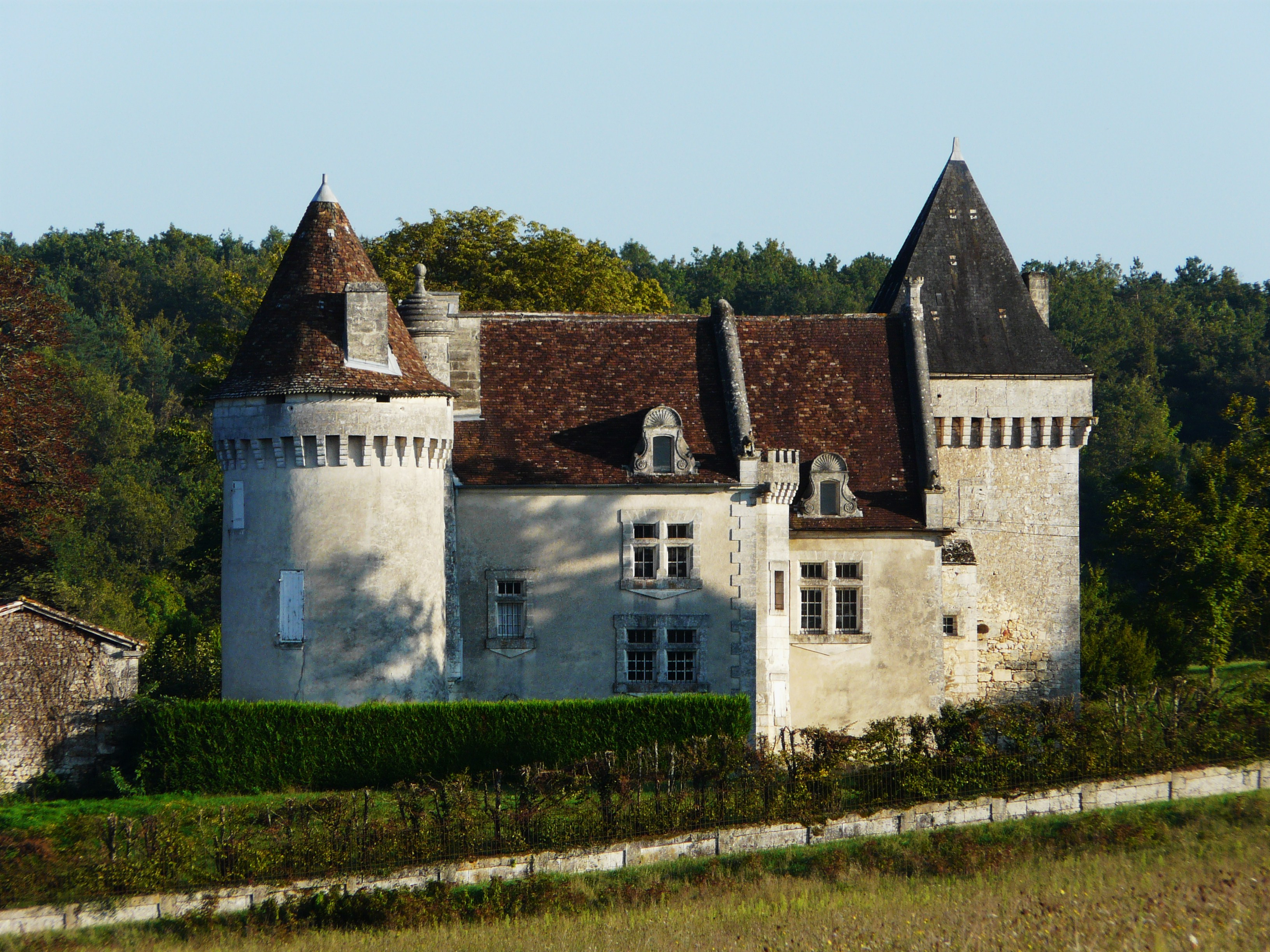 Château de Bellussière, Rudeau-Ladosse, Dordogne, France Object location45° 29′ 41″ N, 0° 32′ 10″ E .